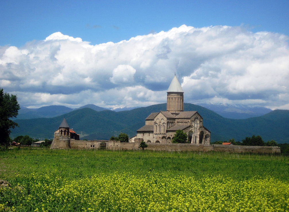 ალავერდი